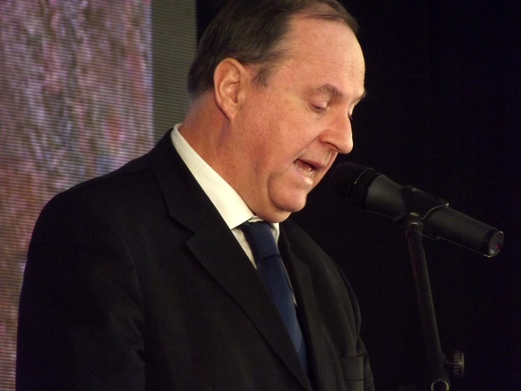 Zdjęcie zrobione podczas 68. rocznicy wyzwolenia nazistowskiego obozu koncentracyjnego KL Auschwitz - Birkenau.